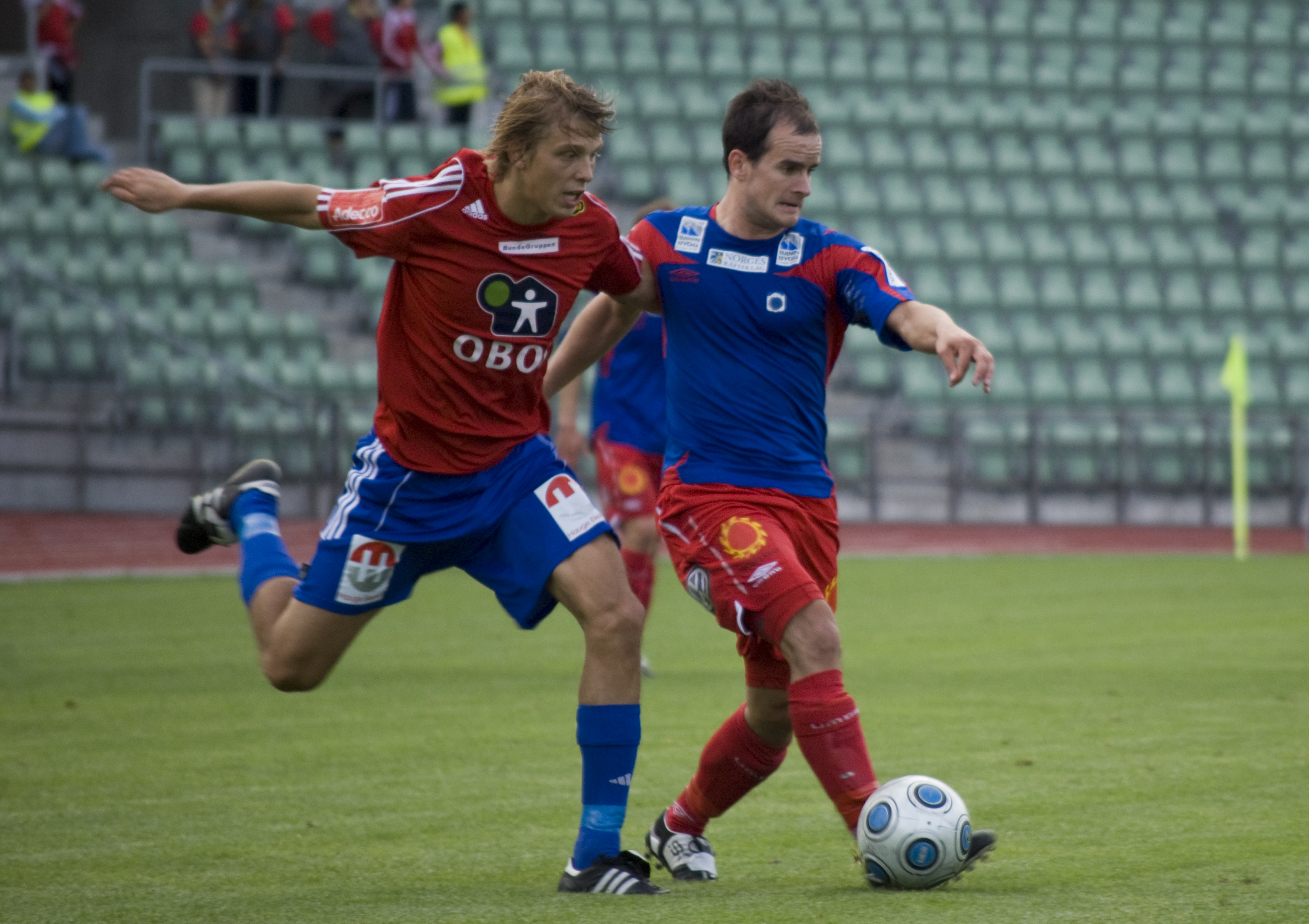 Skeid Fotball - Tromsdalen UIL 2-0 (2-0) at Bislett stadion 12 July 2009. Morten Slorby, Skeid (left); Reidar Waage, Tromsdalen (right).